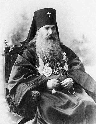 Митрополит Агафодор (Преображенский) (1837-1919)